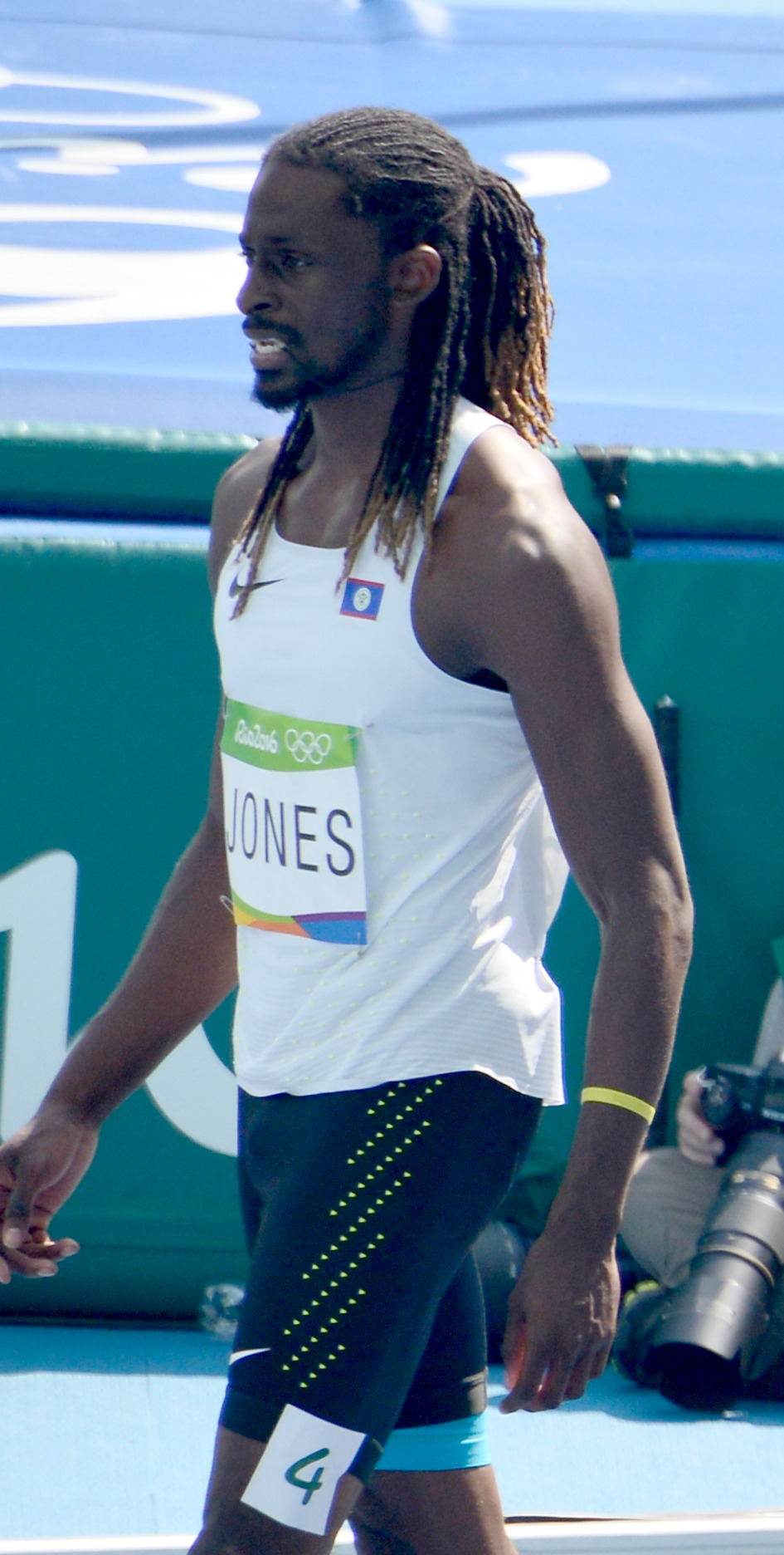 Séries du 200m Homme aux JO de Rio 2016